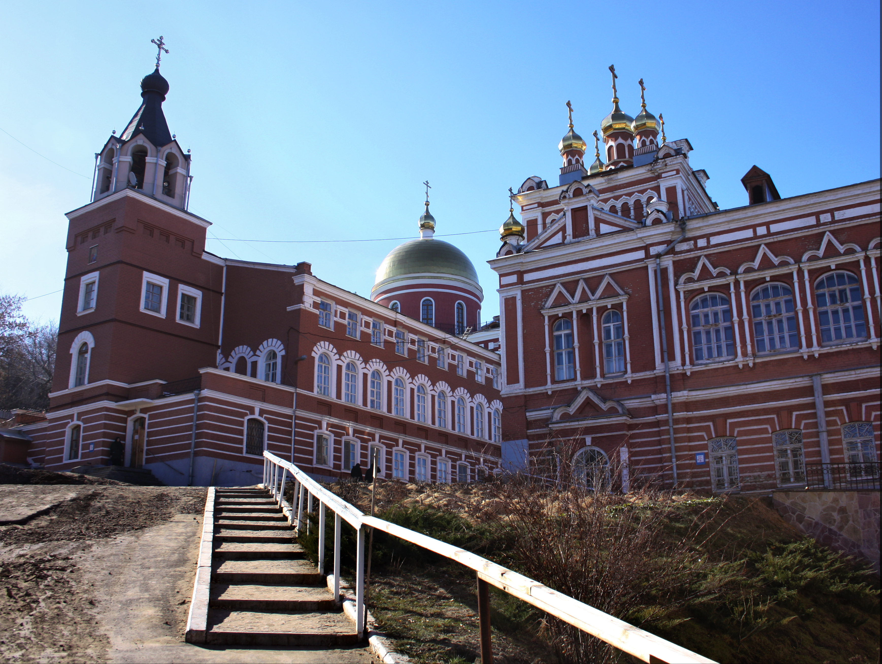 Самара, Иверский женский монастырь